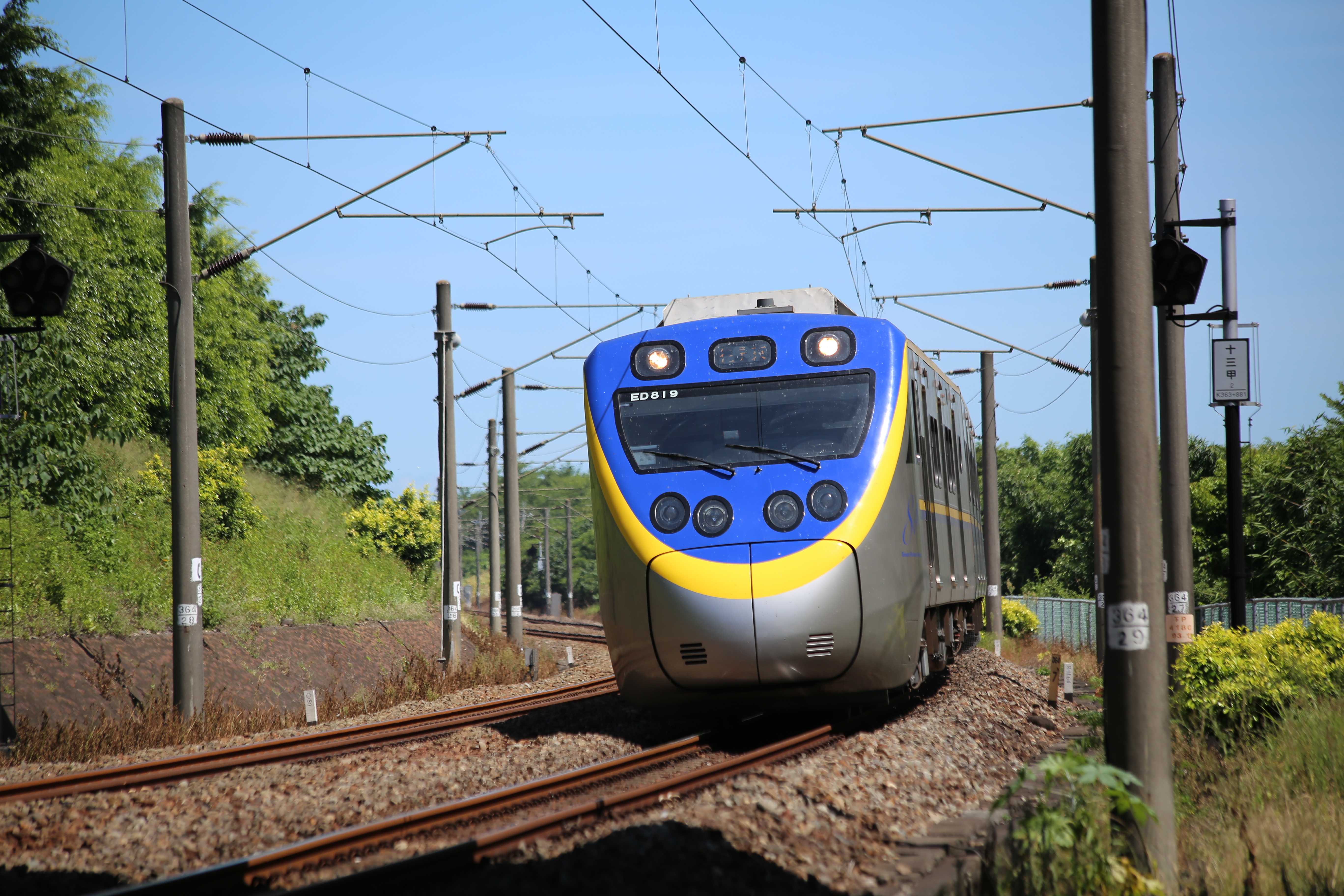 EMU800型電聯車行經台南=保安間